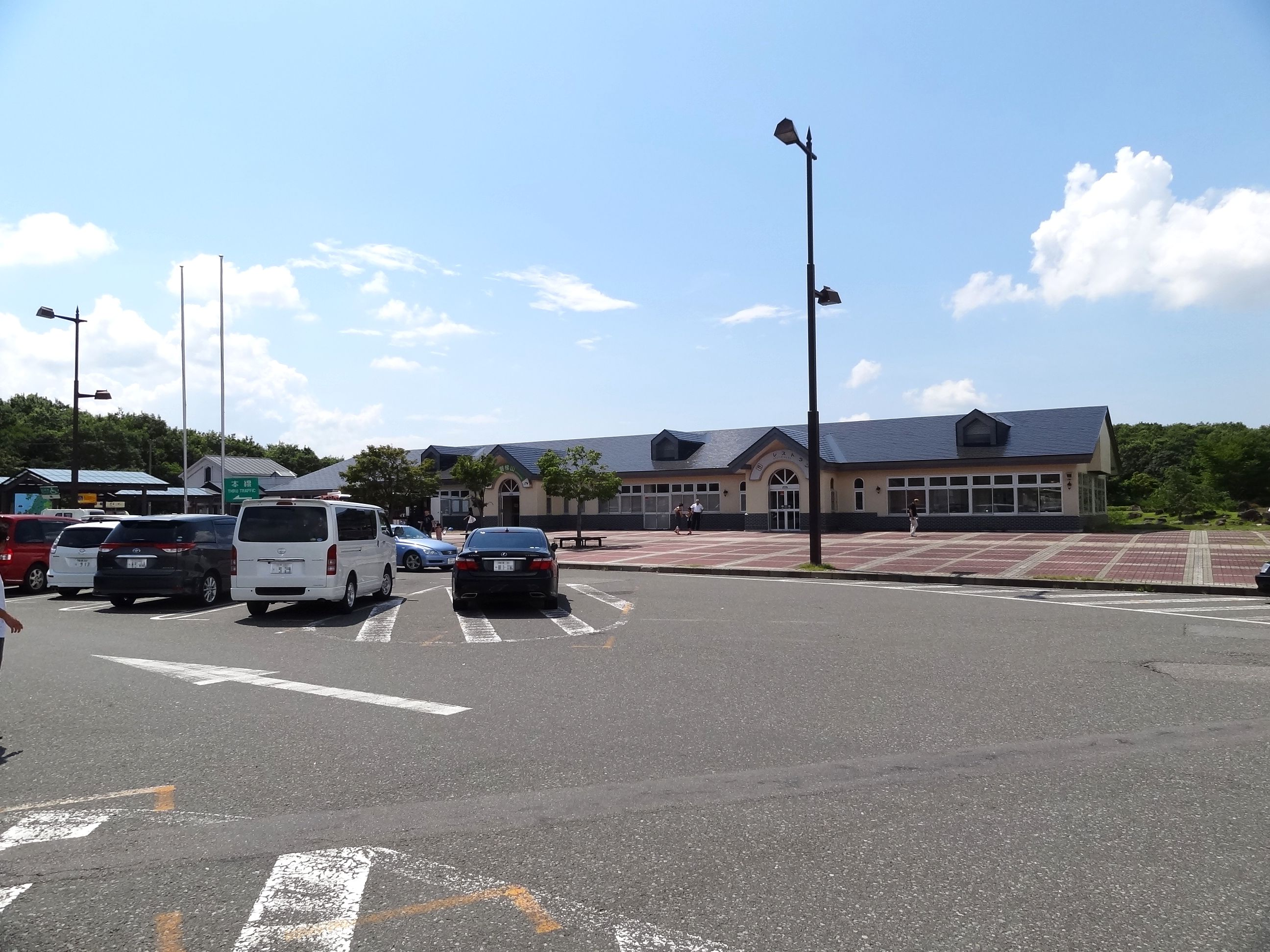 磐越自動車道 磐梯山サービスエリア（上り線）。